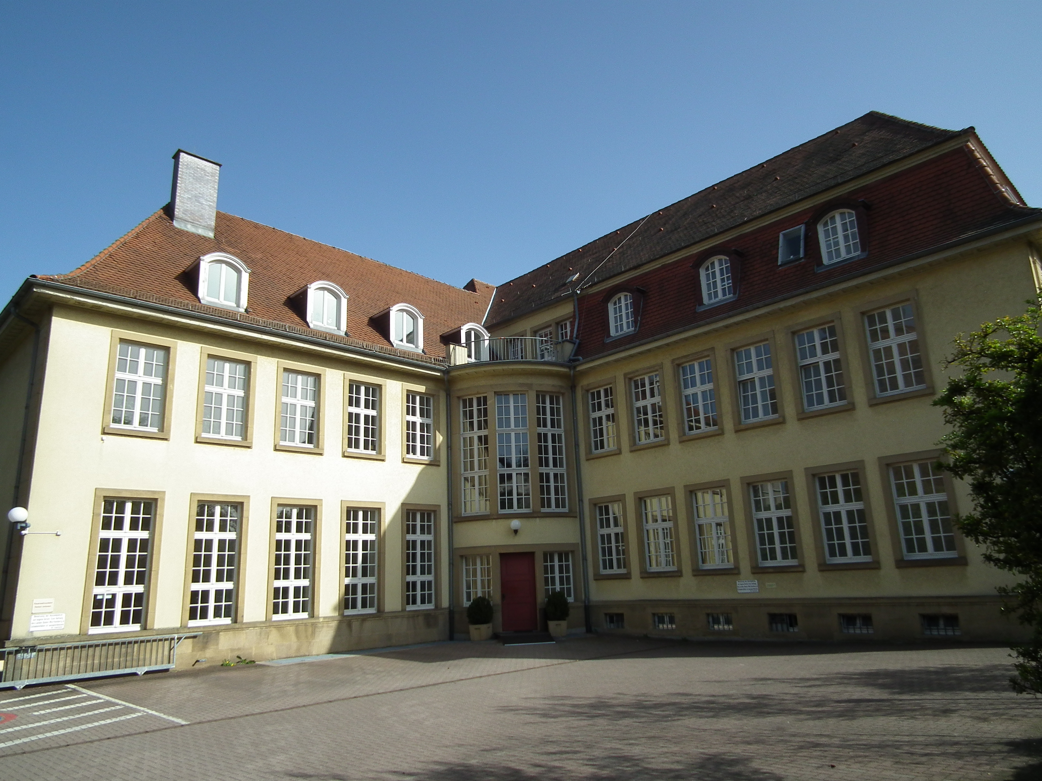 Amtsgericht in Wiesloch (Baden-Württemberg, Deutschland)